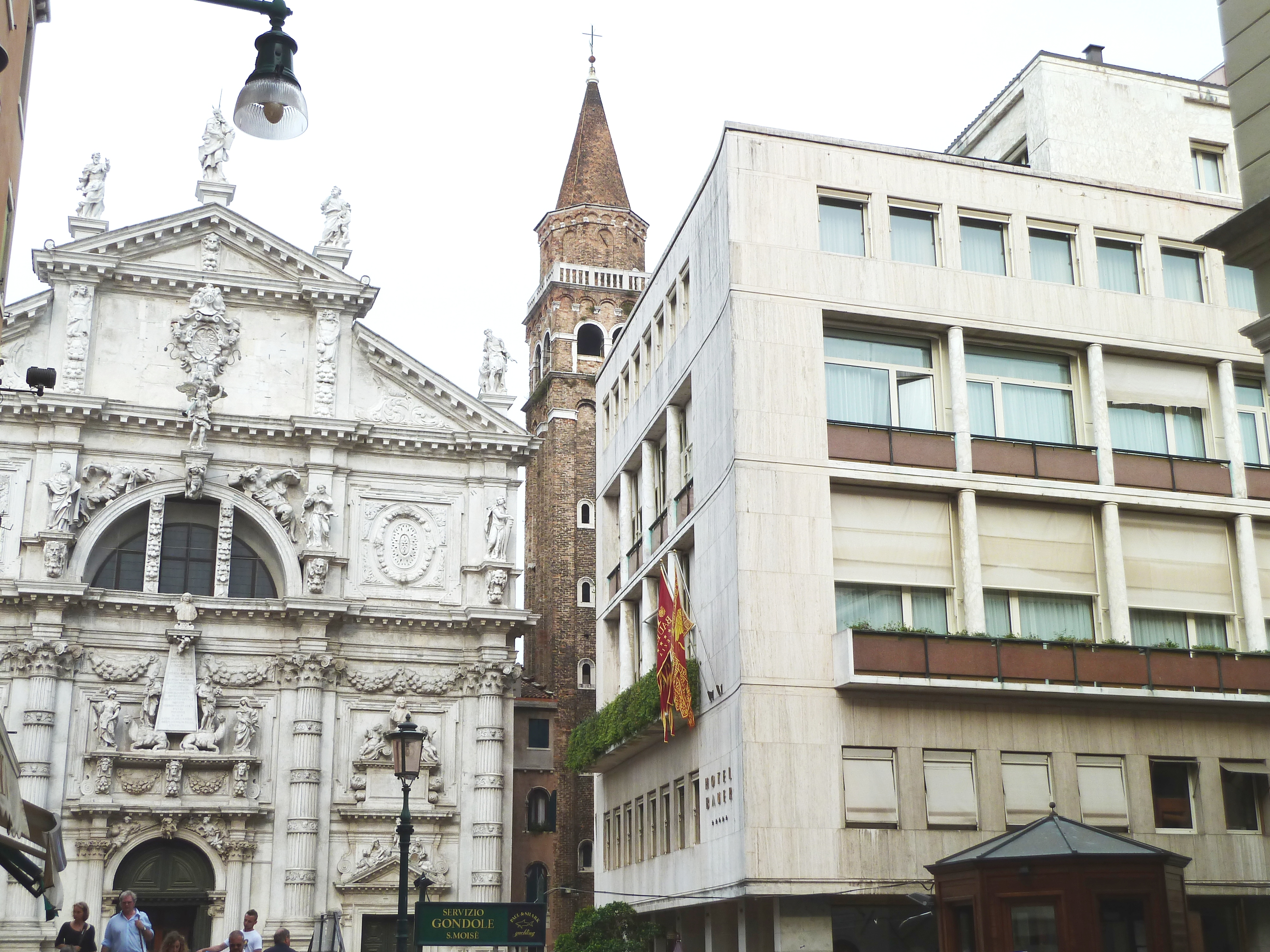 Campo San Moisè (Venice)